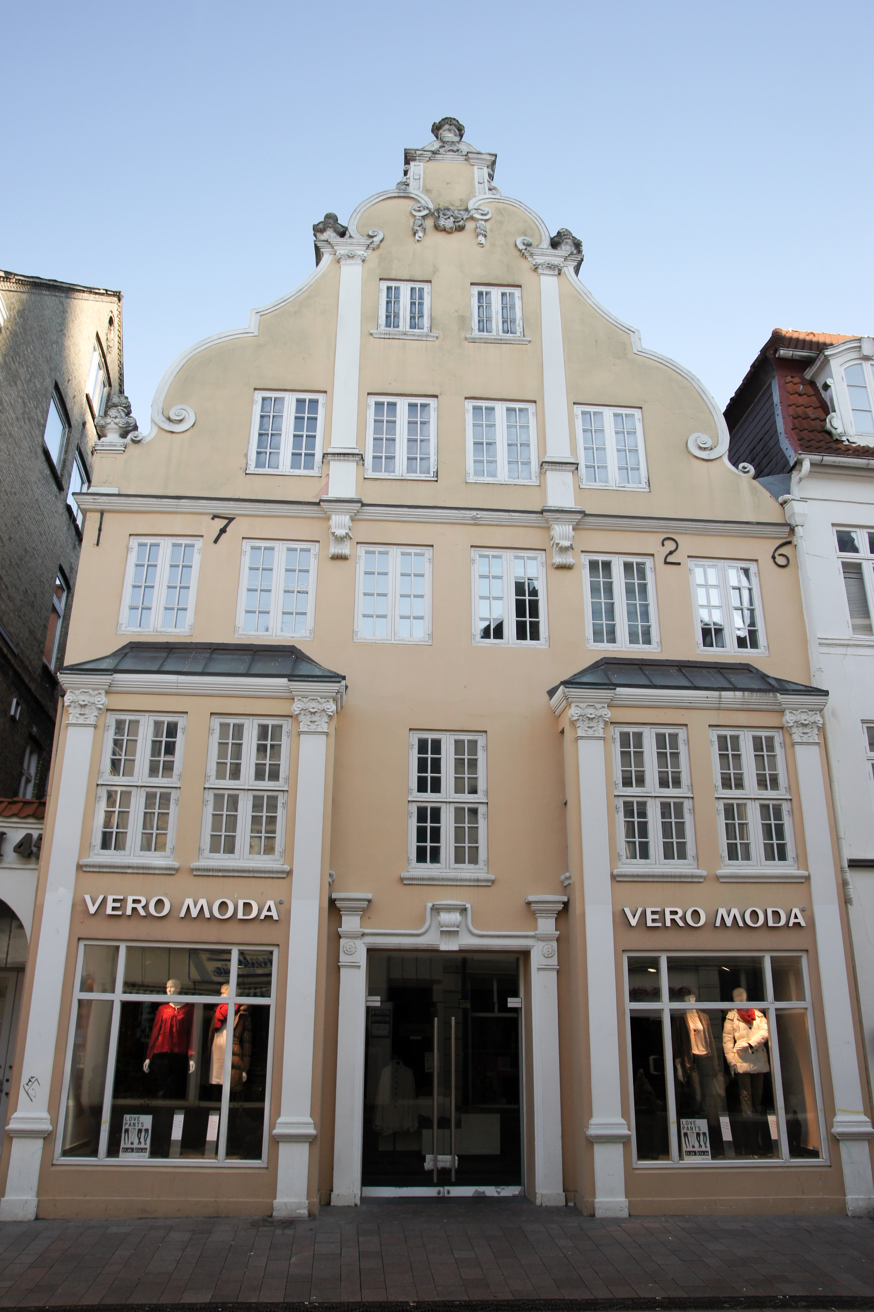 Flensburg, Holm 45, Denkmal Nr.: 46.2, Vorderhaus; Im Erdgeschoss befinden sich Verkaufsräume